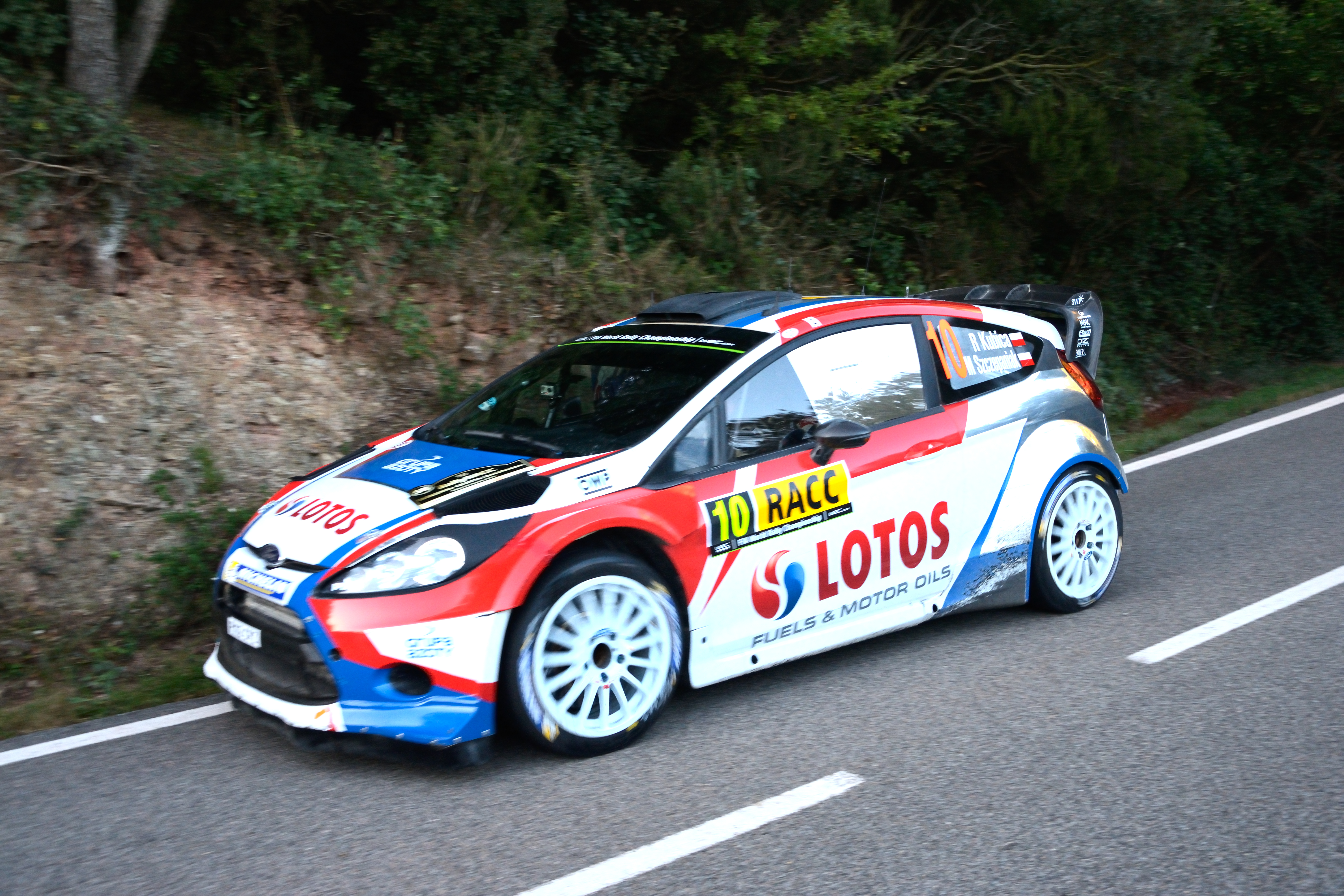 Duesaigües, 43773, Tarragona, Spain